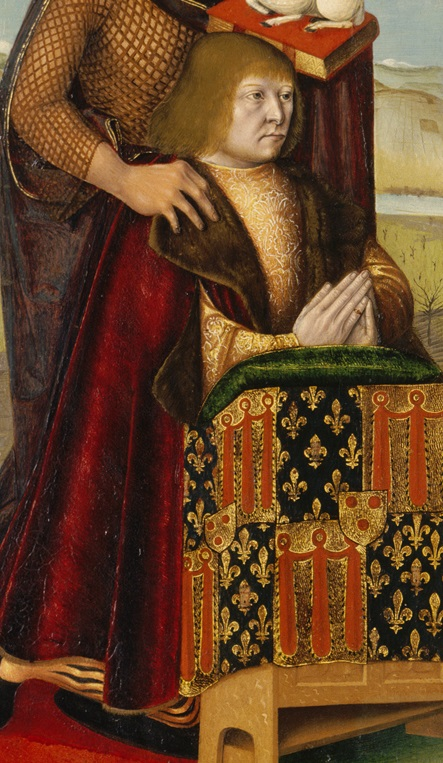 Détail du tableau Triptyque de Vic-le-Comte / The Annunciation with Saints and Donors, also called/aussi nommé The Latour d’Auvergne Triptych